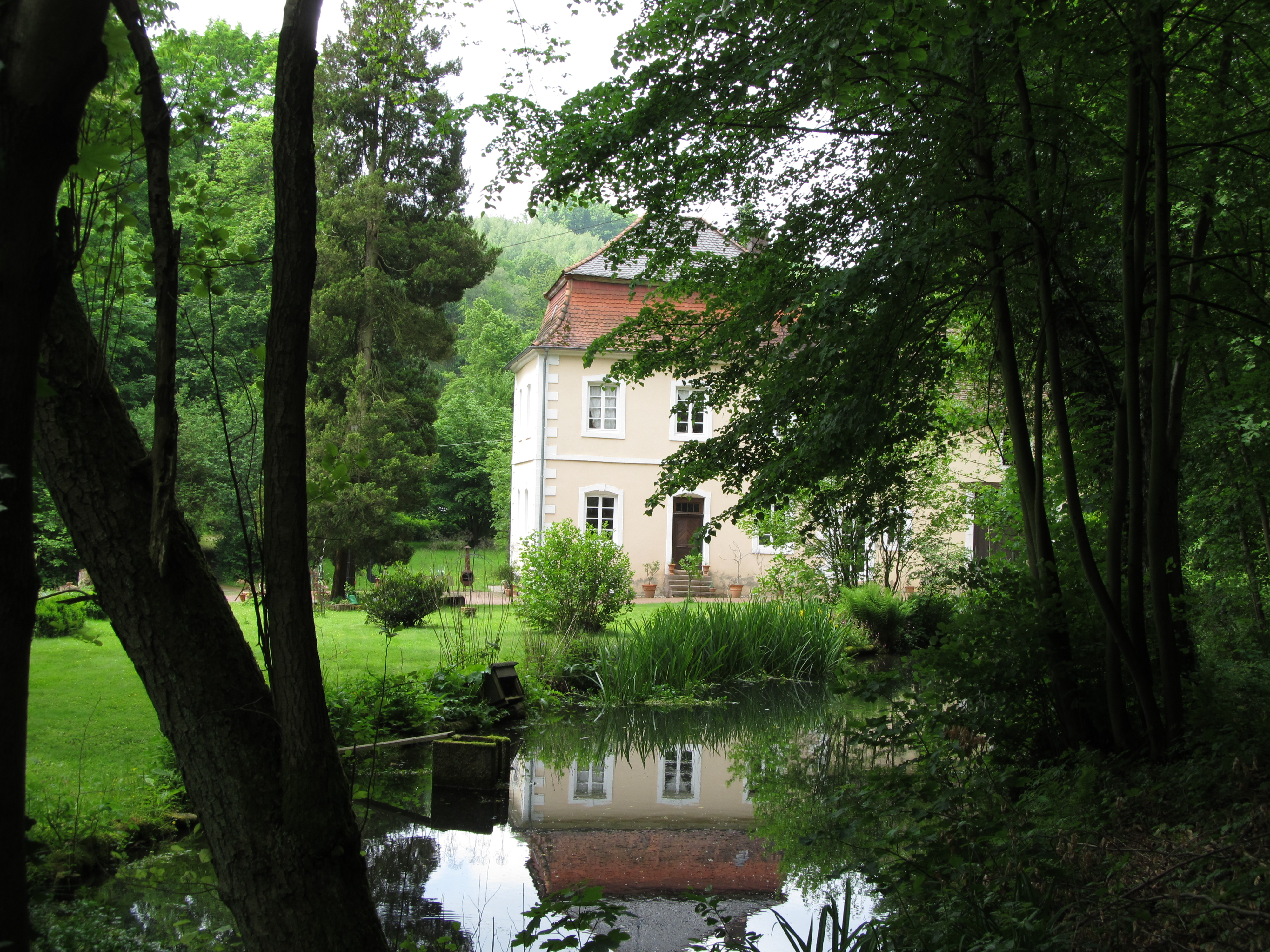 Teil des nördlichen Seitenflügels von Schloss Gutenbrunn